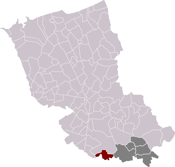 Locatie gemeente Haverskerke in arrondissement Duinkerke. Zelfgemaakt. Location of Haverskerque municipality in the arrondissement of Dunkirk. Self made. Localisation de la commune d'Haverskerque dans l'arrondissement de Dunkerque. Fait moi-même.